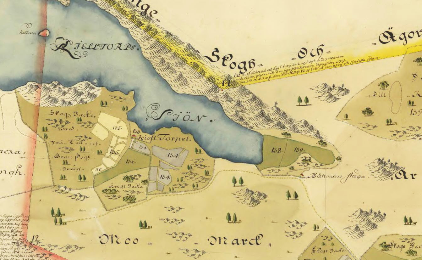 Del av Erstaviks ägor visande Källtorp